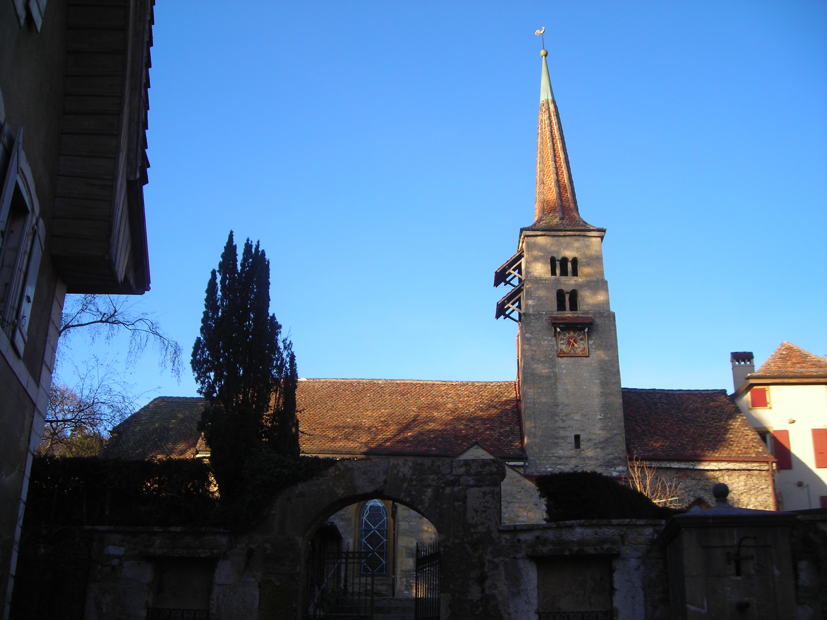 Photographie en couleurs d'un bâtiment